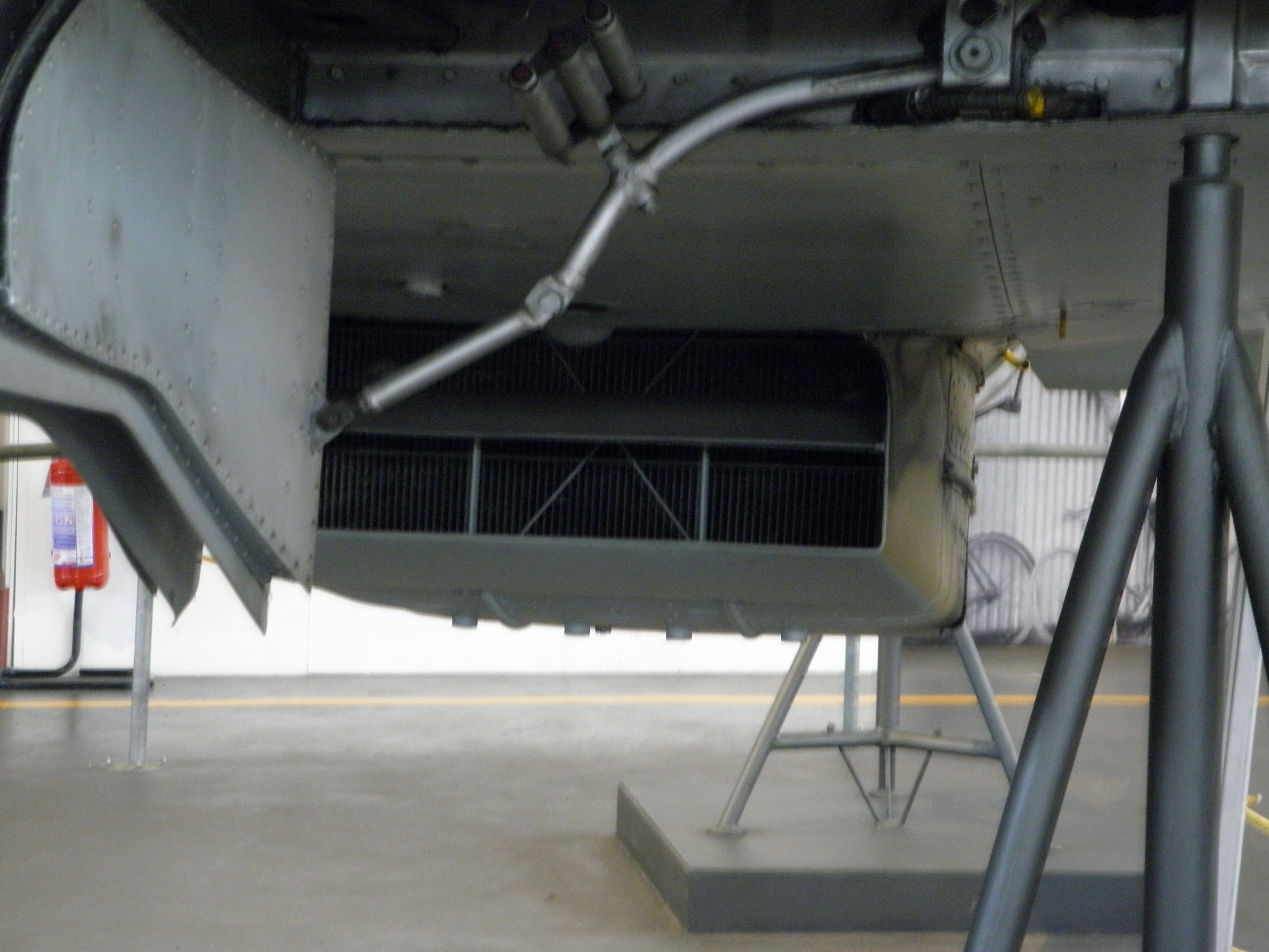 Milano, Museo Nazionale della Scienza e della Tecnologia: Macchi MC.205, dettaglio ventre, presa d'aria radiatore.